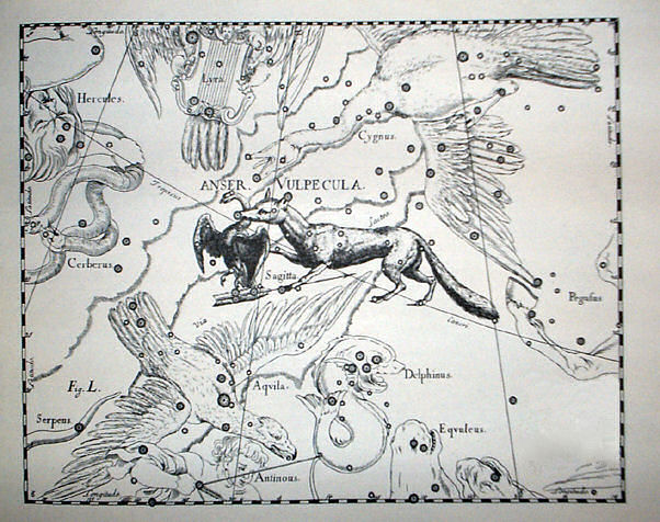 Tavola rappresentante la costellazione della Volpetta nel Firmamentum Sobiescianum, sive uranographia contenuto nel Prodromus Astronomiae